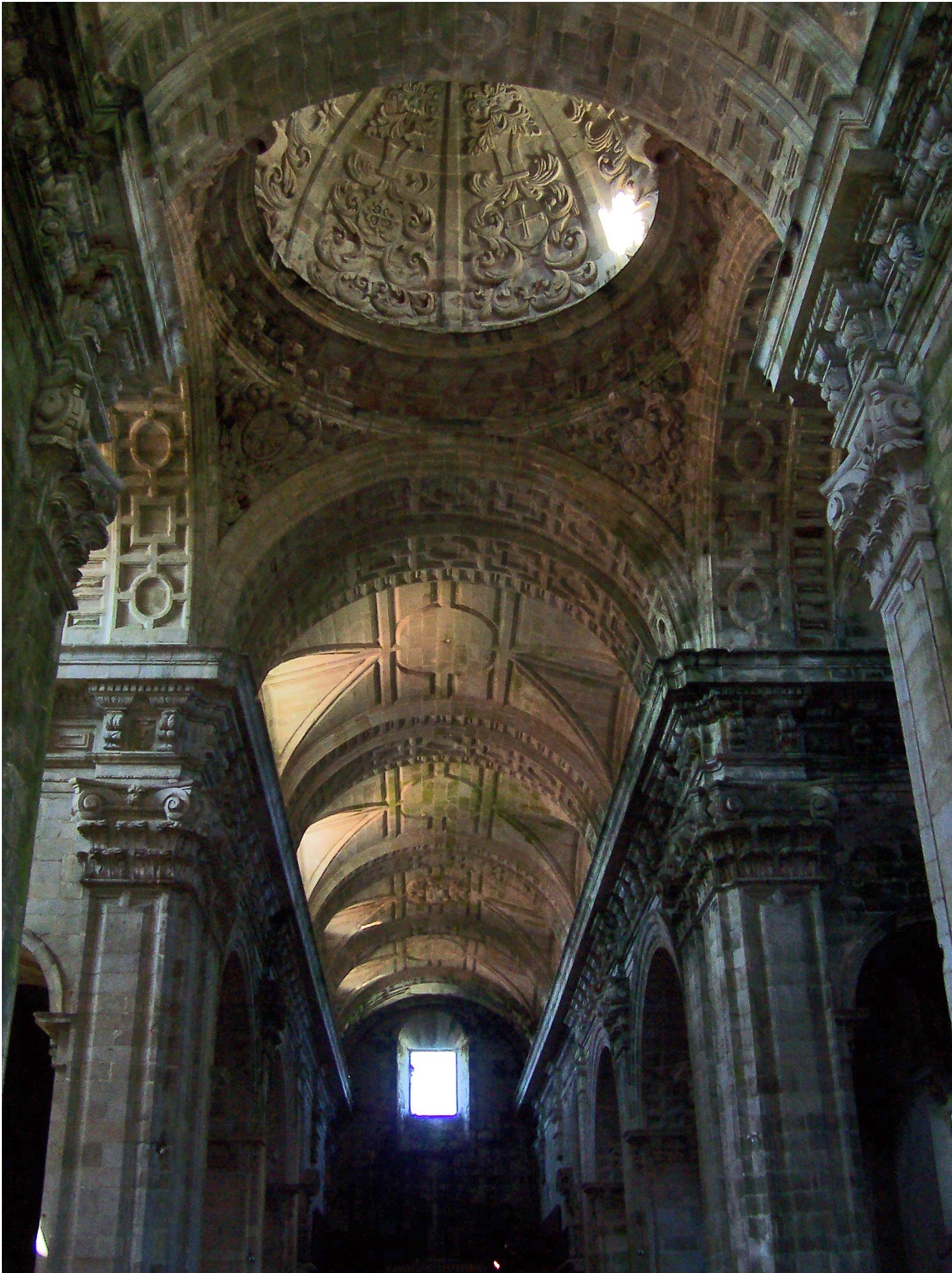 Sobrado dos Monxes Mosteiro de Santa María de Sobrado dos Monxes Grande complexo que alcanzou o seu apoxeo nos s. XV e XVI. Abandonado no século pasado, foi novamente ocupado e restaurado dende finais dos anos 50. A igrexa actual é Barroca, do S XVII .Destacan as capelas da Madalena e a do Rosario, e a sancristía Renacentista (obra de Juan de Herrera). Os tres claustros, o da hospedaxe, o das procesións e o grande, a sala capitular, a súa espectacular cociña e o comedor, completan as principais estanzas.